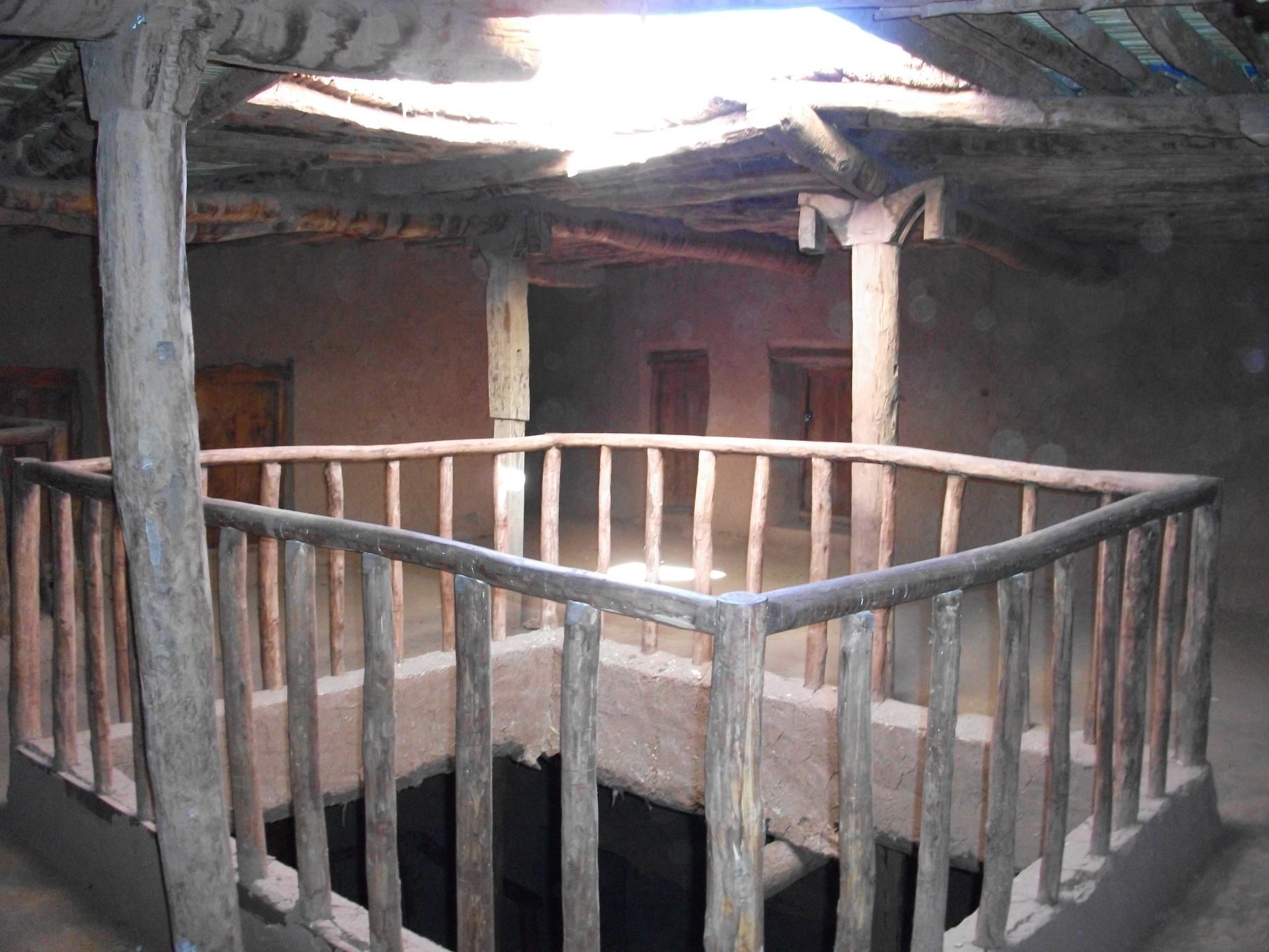 Agadir Ighrem n’Ougdal, Innen